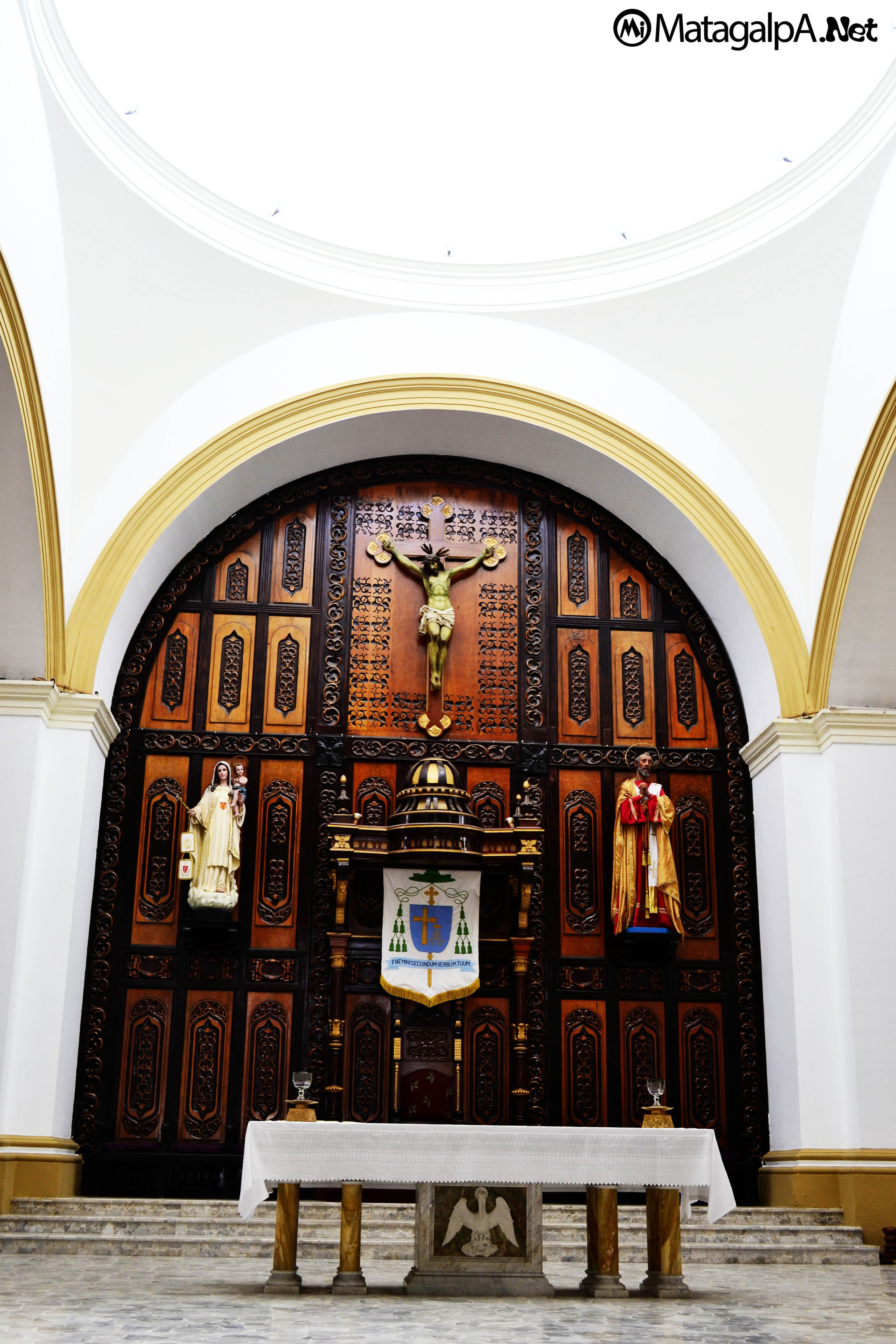 Matagalpa Nicaragua .